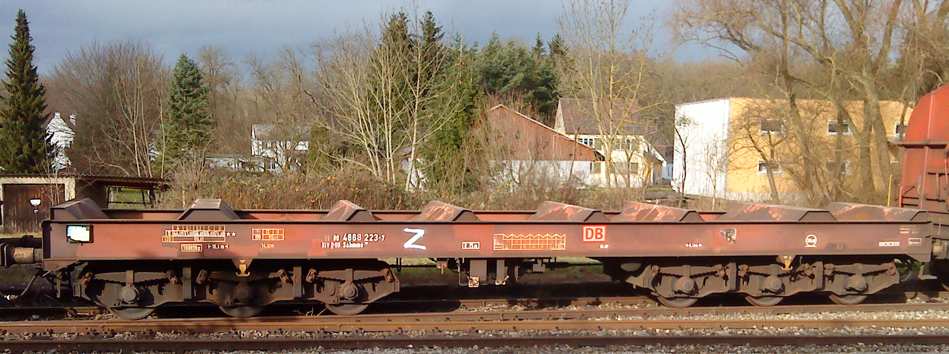 Sechsachsiger Flachwagen Sahmms 710 der DB für den Transport von Coils, aufgenommen im Bahnhof Günzburg